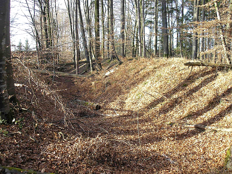 Sunderburg bei Schöngeising (Landkreis Fürstenfeldbruck, Oberbayern). Blick in das südwestliche Wallsystem. Blickrichtung Nordwesten. Eigene Aufnahme, Jan. 2008 / Sunderburg castle near Schoengeising ( Landkreis Fuerstenfeldbruck, Upper Bavaria, Germany) The south western earthworks, looking north west. Own photo, Jan. 2008